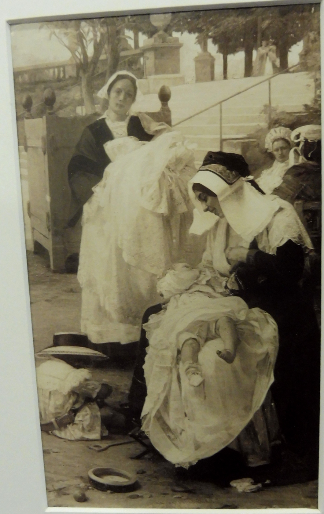 Hubert-Denis Etcheverry, Les nounous. Ariégeoise et Bretonne. 1899. Exposition Goupil, bibliothèque Flora Tristan à Bordeaux, été 2017.